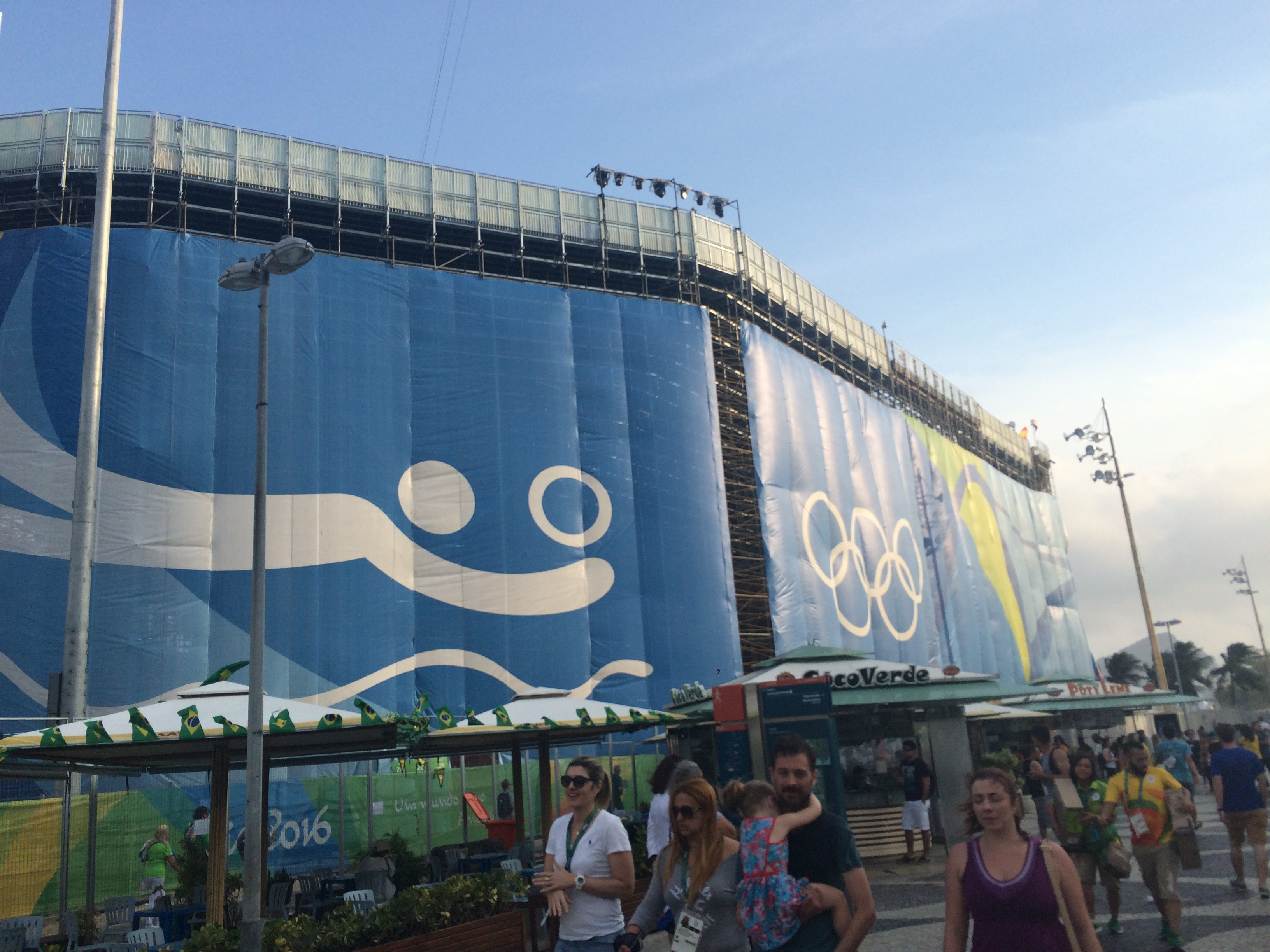 Visão posterior da Arena de Vôlei de Praia de Copacabana - Rio 2016